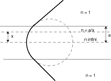 réfraction dans un milieu homogène